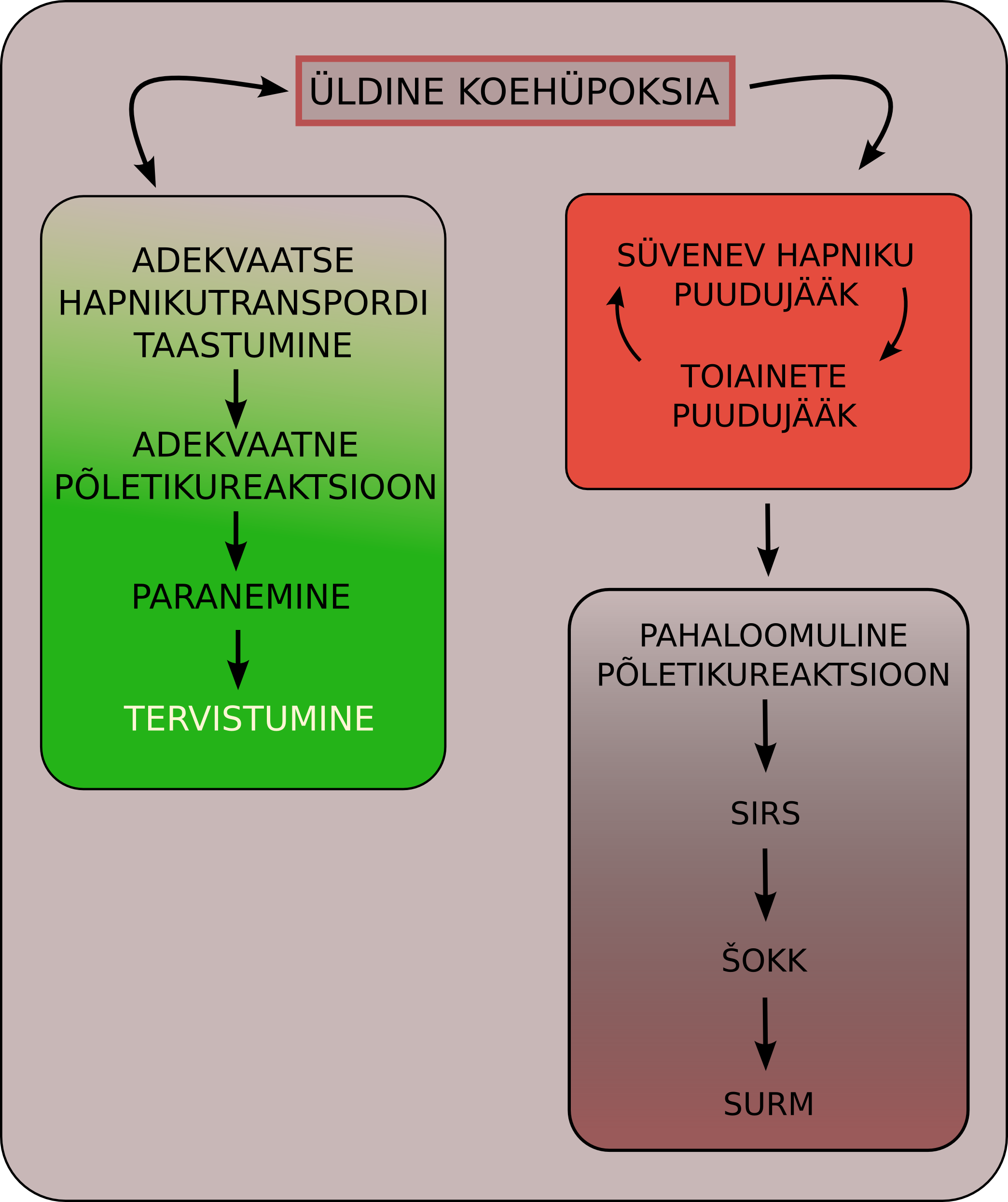 Šokk, patofüsioloogia